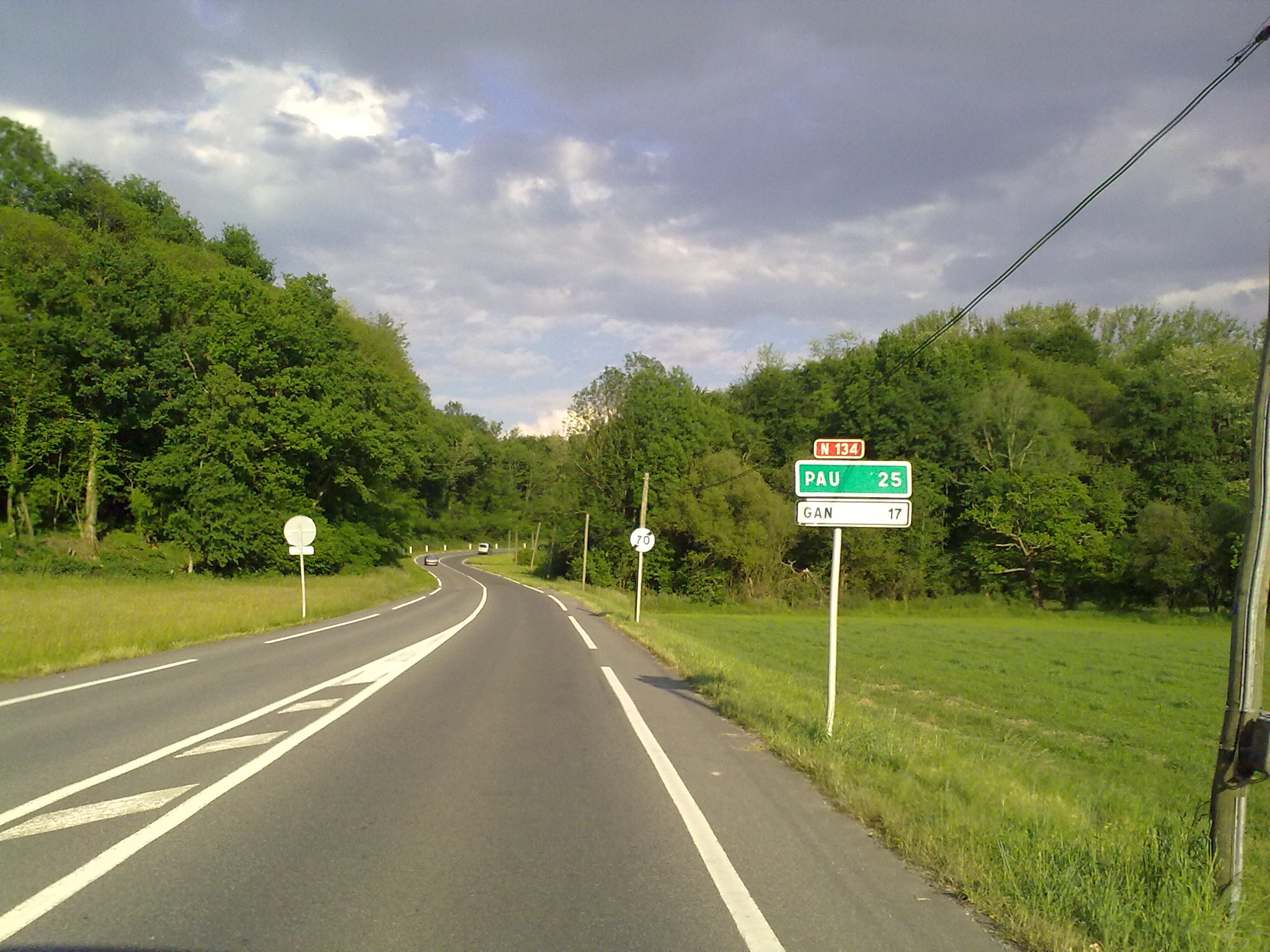 La E7 en France le 24 mai 2010.